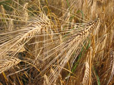 Hordeum vulgare